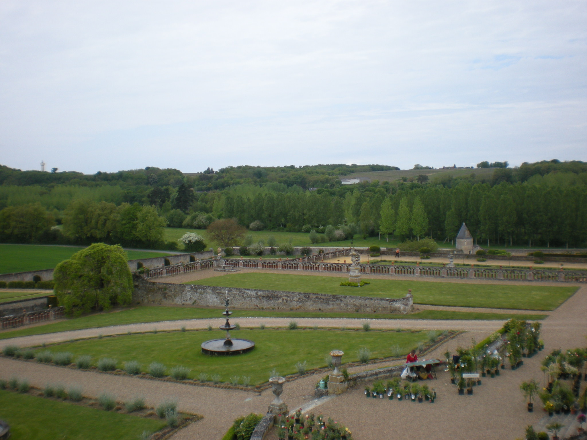 Château de Valmer, jardin à Chançay, France .